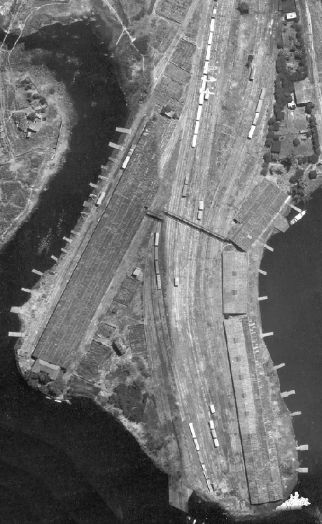 F.C.O.